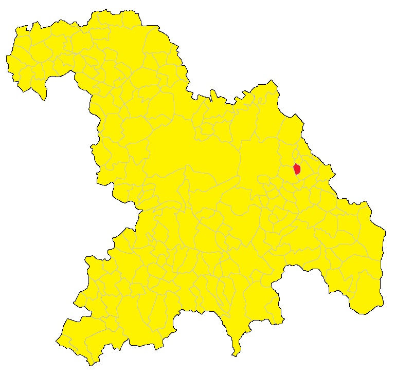 Mappa di Berzano di Tortona (AL)